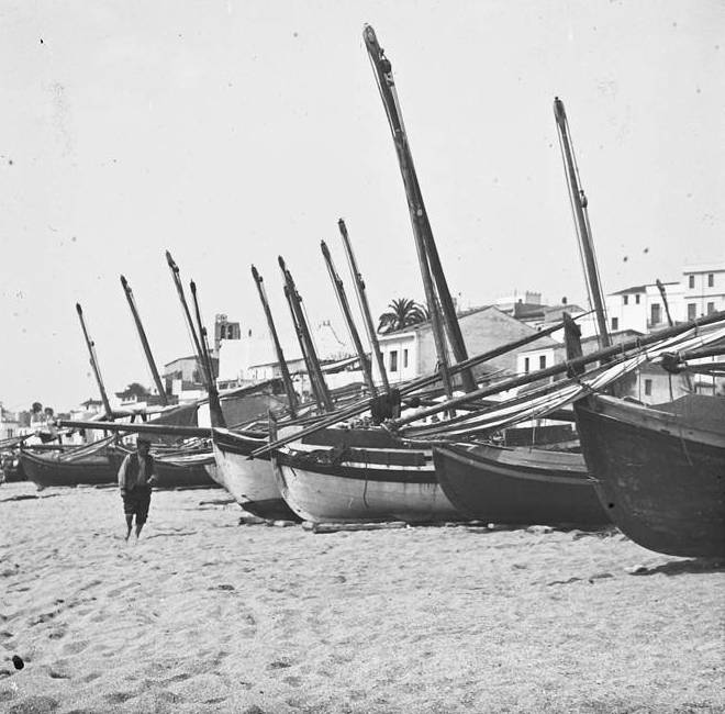 Platja a Sant Pol. Josep Salvany i Blanch (1912)